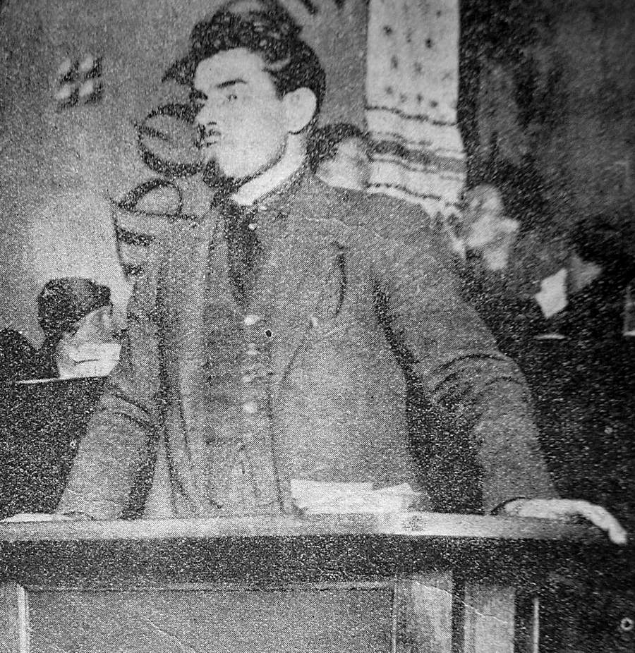 Олександр Шумський, наркомпрос України